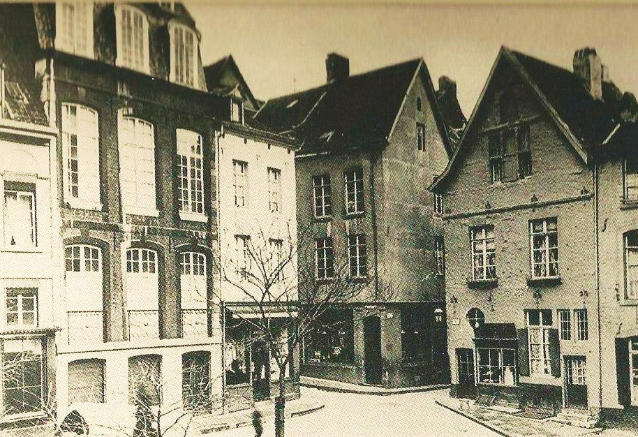 Kreuzungsbereich Hof - Rommelsgasse und Körbergasse in Aachen mit der rückseitigen Ansicht des Hauses Monheim (heute Couven-Museum) am Hof und als Eckhaus zur Rommelsgasse das Haus zum Lindenbaum, als Eckhaus zwischen Rommels- und Körbergasse das Haus zur goldenen Waage und als Eckhaus zwischen Körbergasse und Hof das